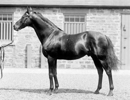 Stsimon01.JPG